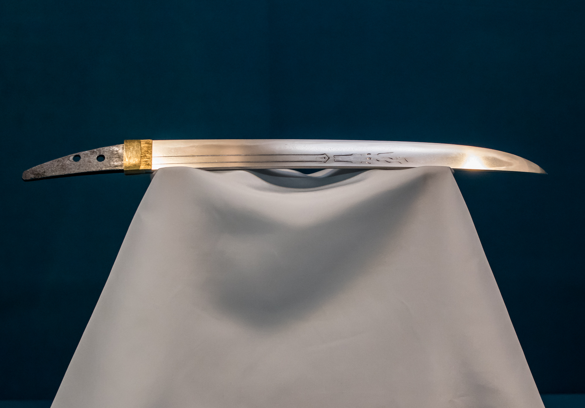 脇指 - 「無銘 貞宗」相州貞宗、号 石田貞宗（重要文化財）。南北朝時代・14世紀。